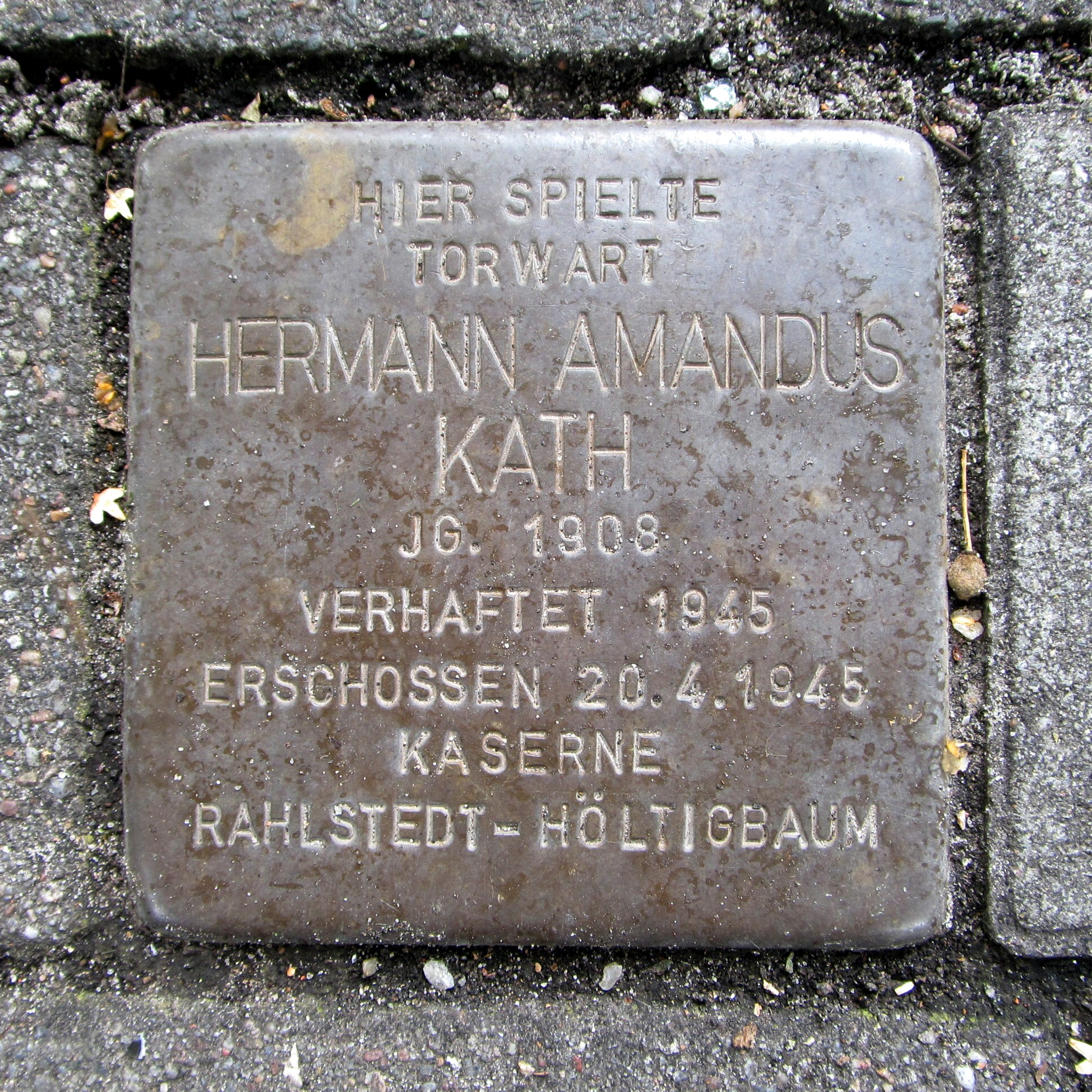 Stolperstein für Hermann Amandus Kath vor dem Vereinsheim des SV St. Georg, Hammer Steindamm 130 in Hamburg-Hamm